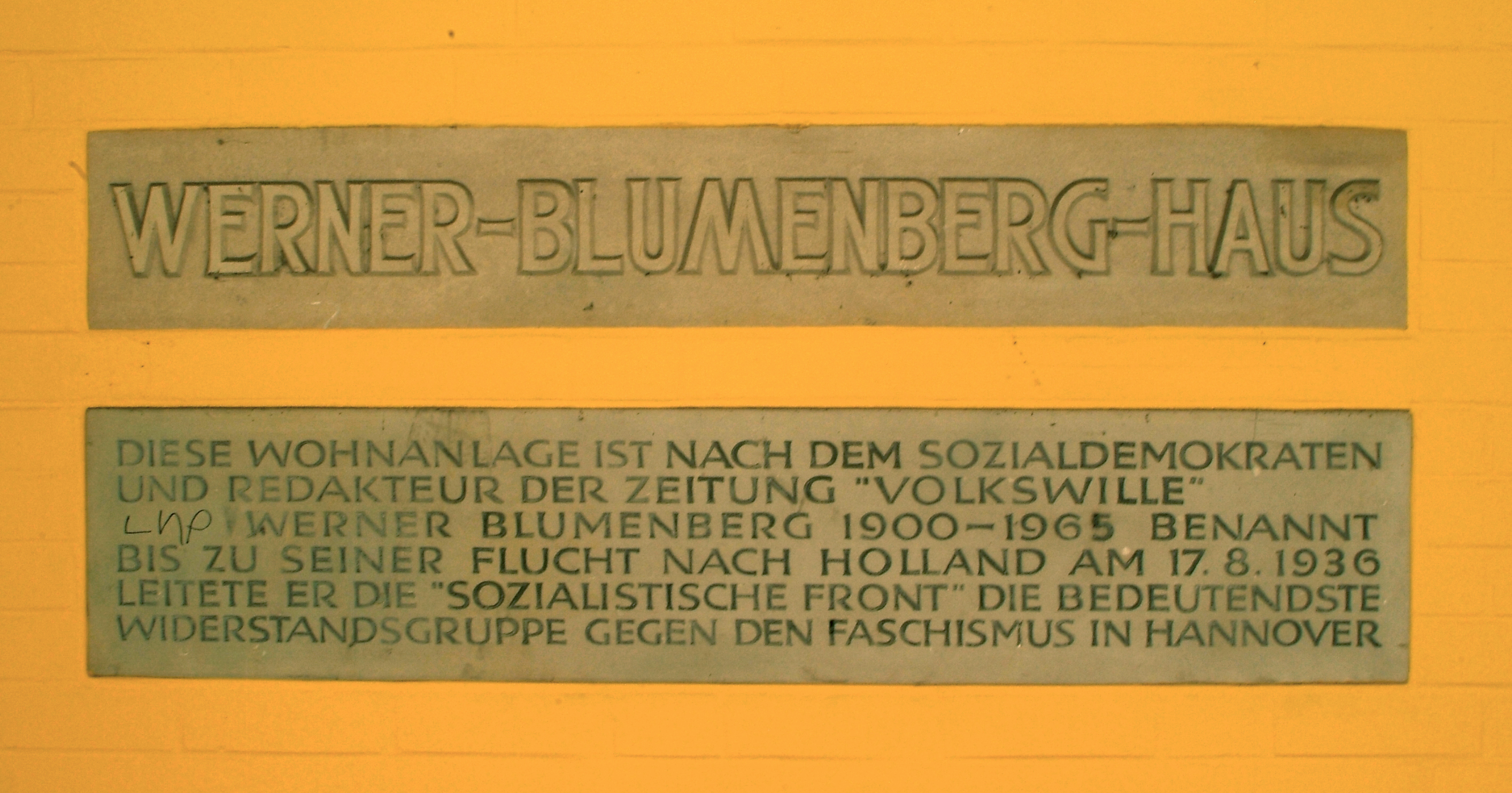 Gedenktafel am Werner-Blumenberg-Haus, Pfarrlandstraße in in Hannover, Linden Nord: "Diese Wohnanlage ist nach dem Sozialdemokraten und Redakteur der Zeitung Volkswille, Werner Blumenberg 1900-1965 benannt. Bis zu seiner Flucht nach Holland am 17. 8. 1936 leitete er die "Sozialistische Front", die bedeutendste Widerstandsgruppe gegen den Faschismus in Hannover."